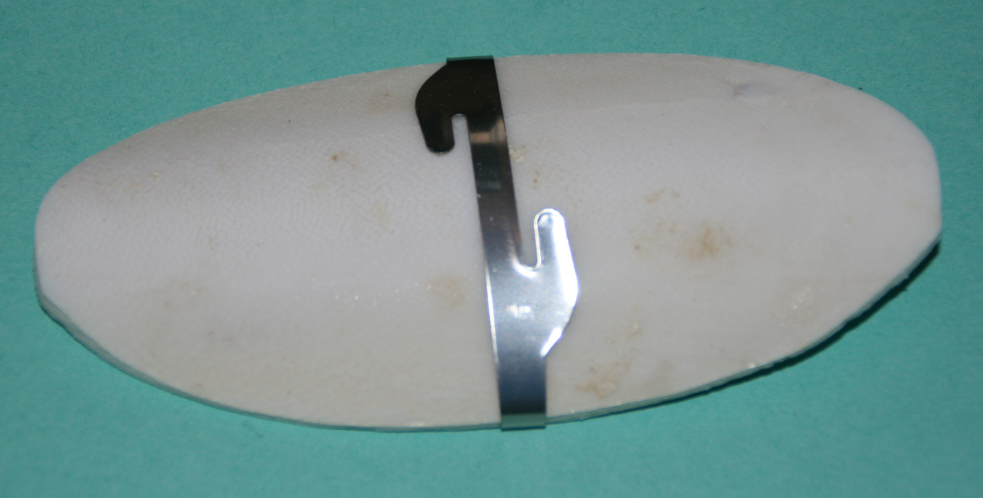 Serpiaschale aus dem Tierhandel